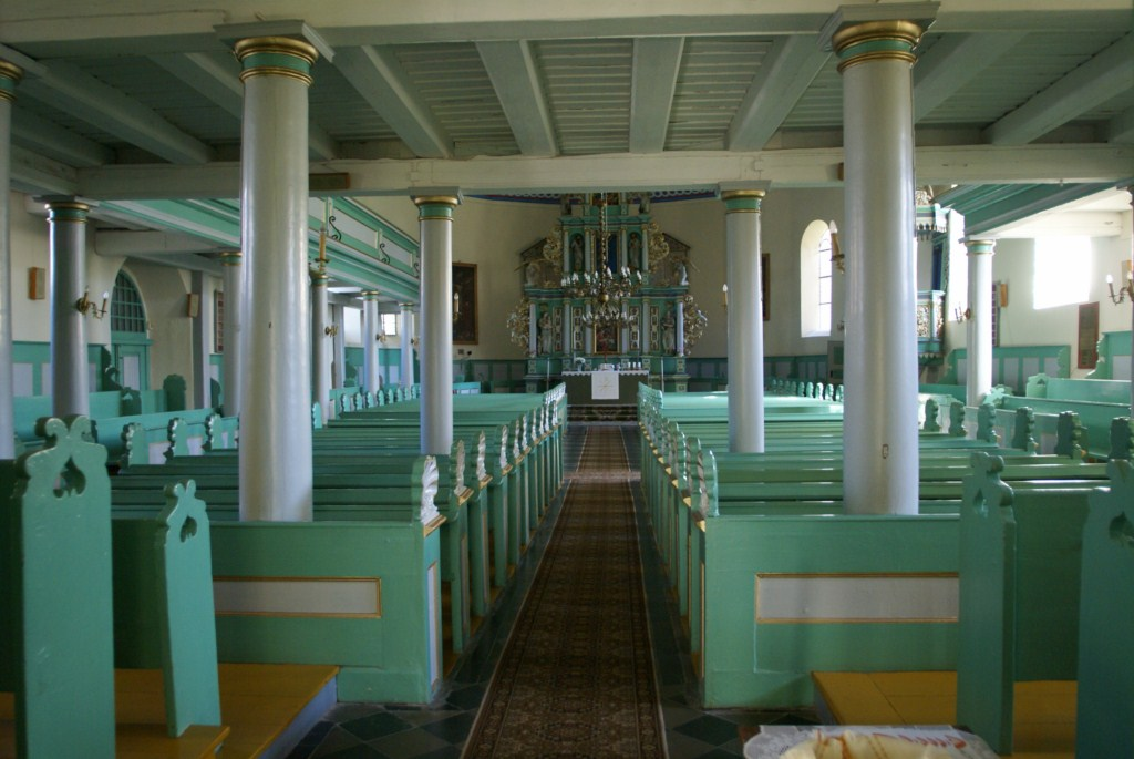 Szczytno, zespół kościoła ewangelickiego, 1718